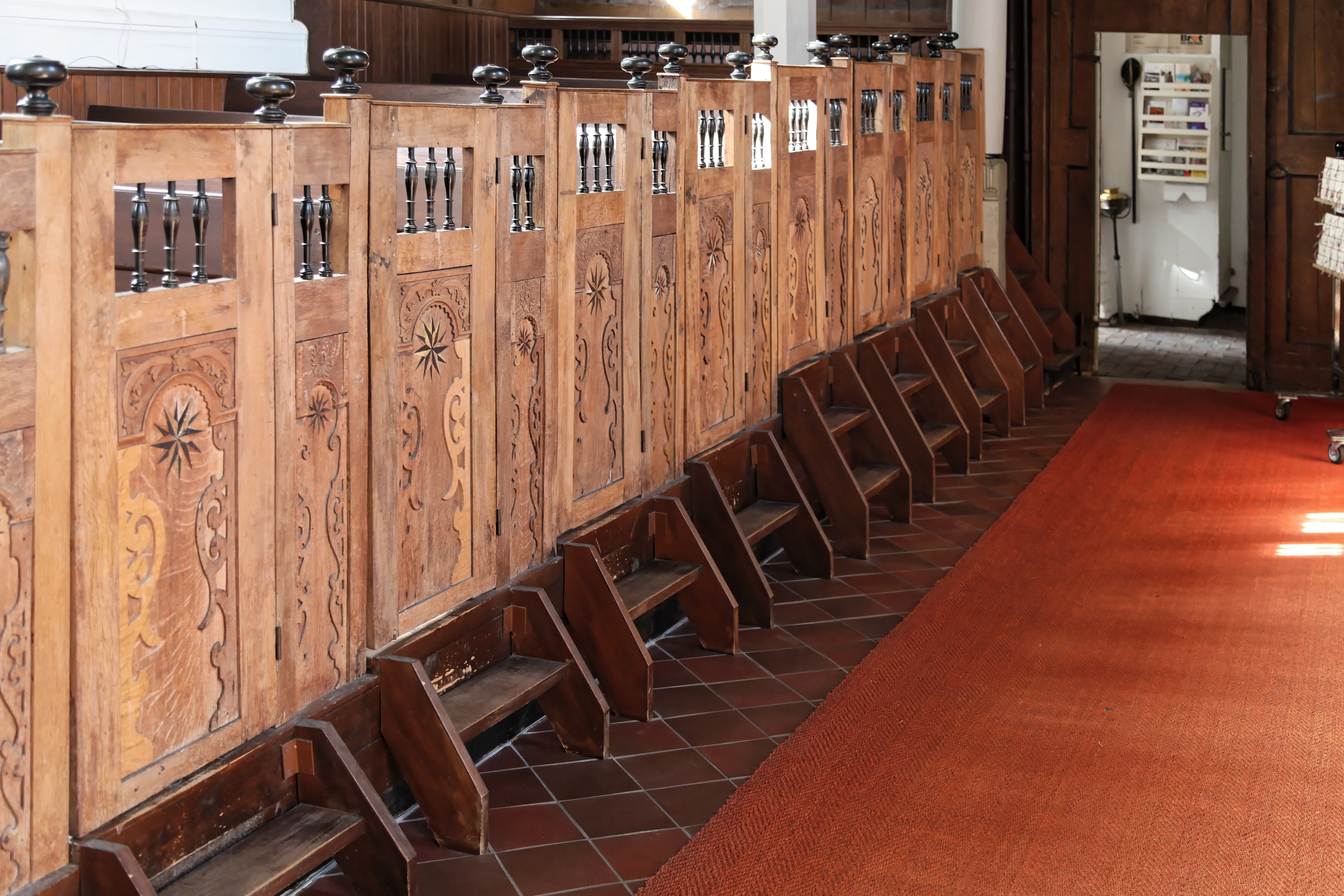 Martinskirche, Kirchring, am Tag des offenen Denkmals in Bunde (Germany)